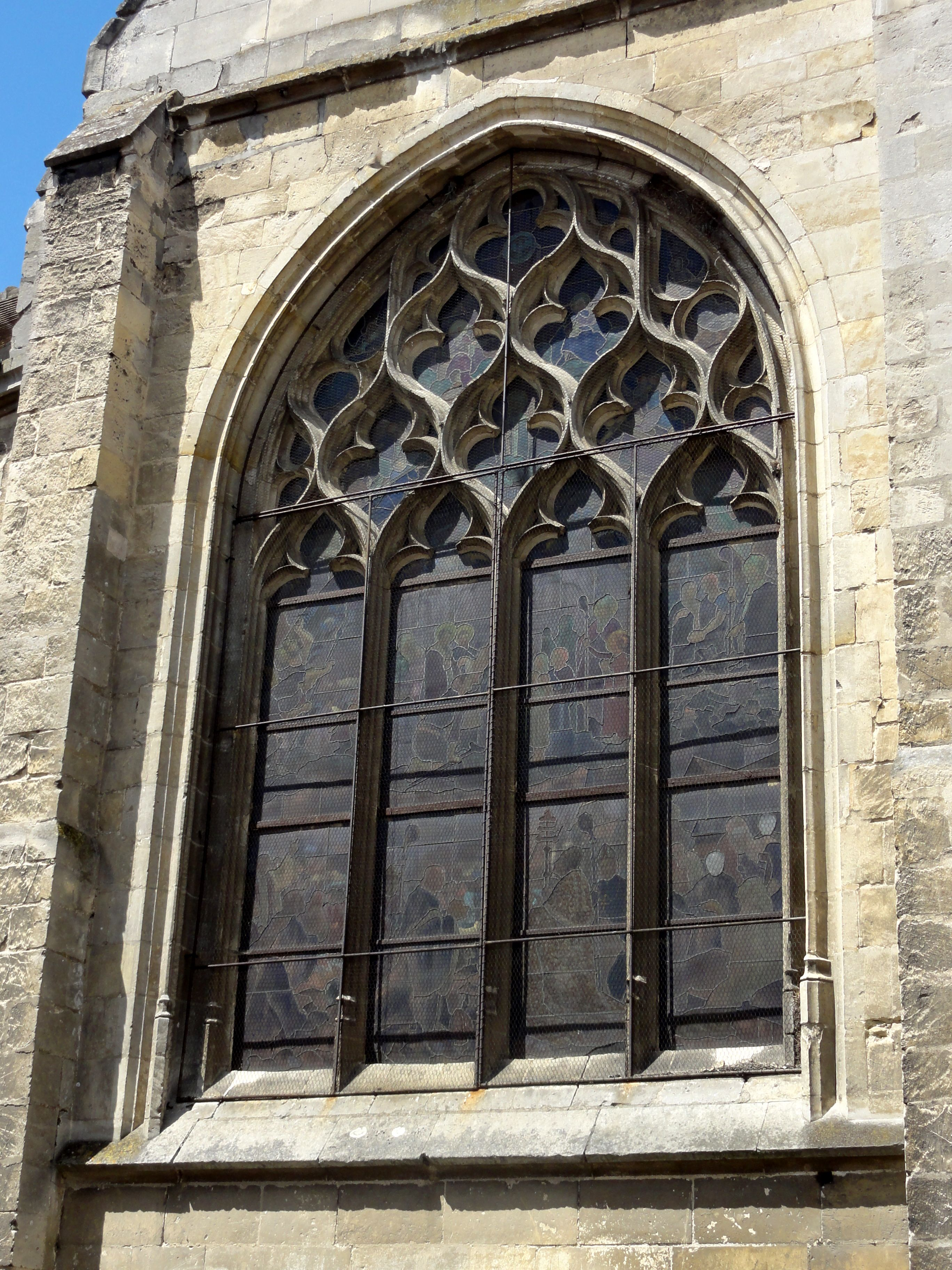 Chevet, baie du vaisseau central.